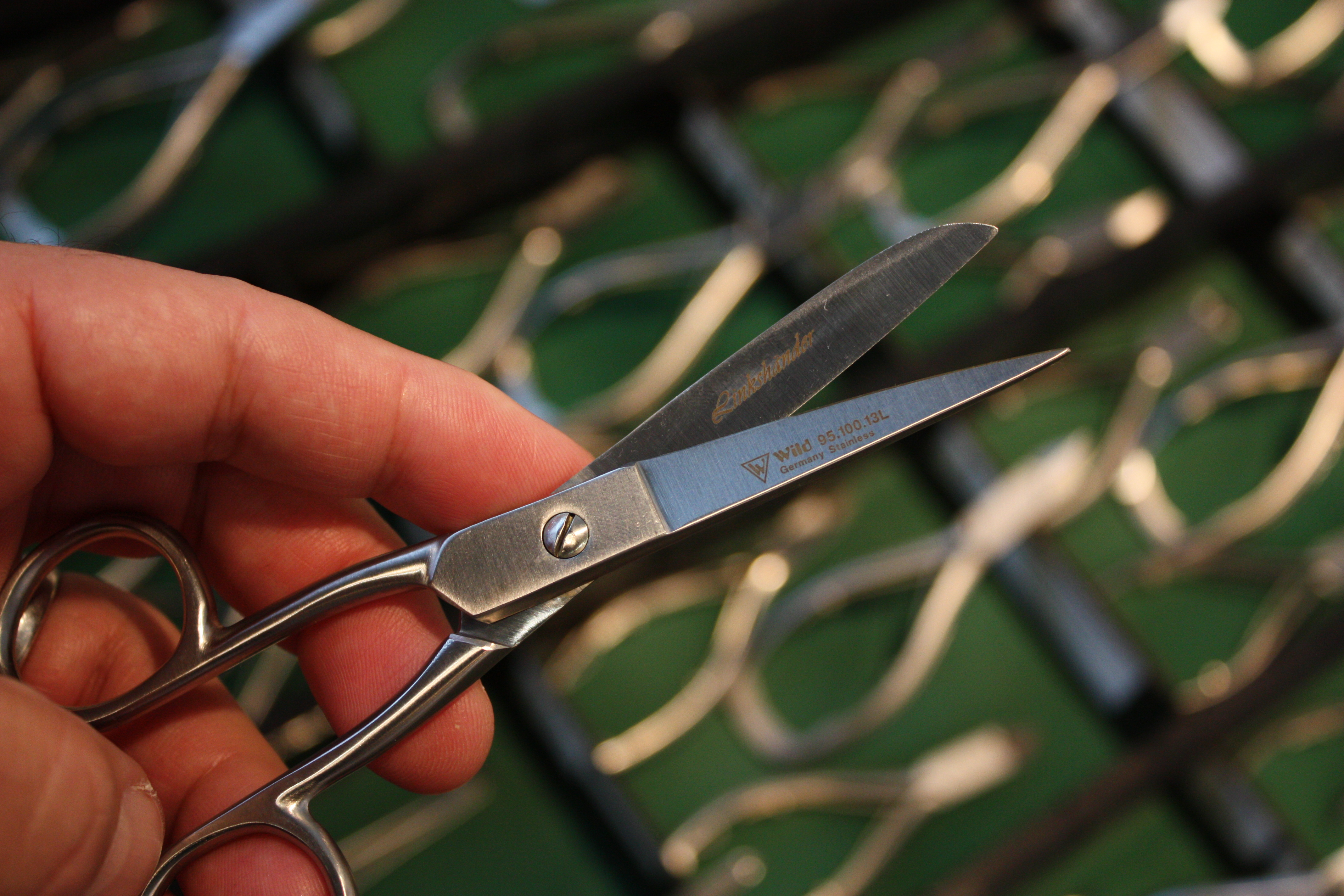 Linkshänderscheere